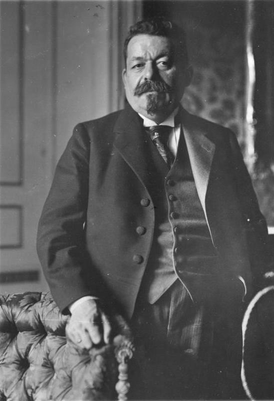 10 Jahre deutsche Republik. Friedrich Ebert, der erste Präsident der deutschen Republik